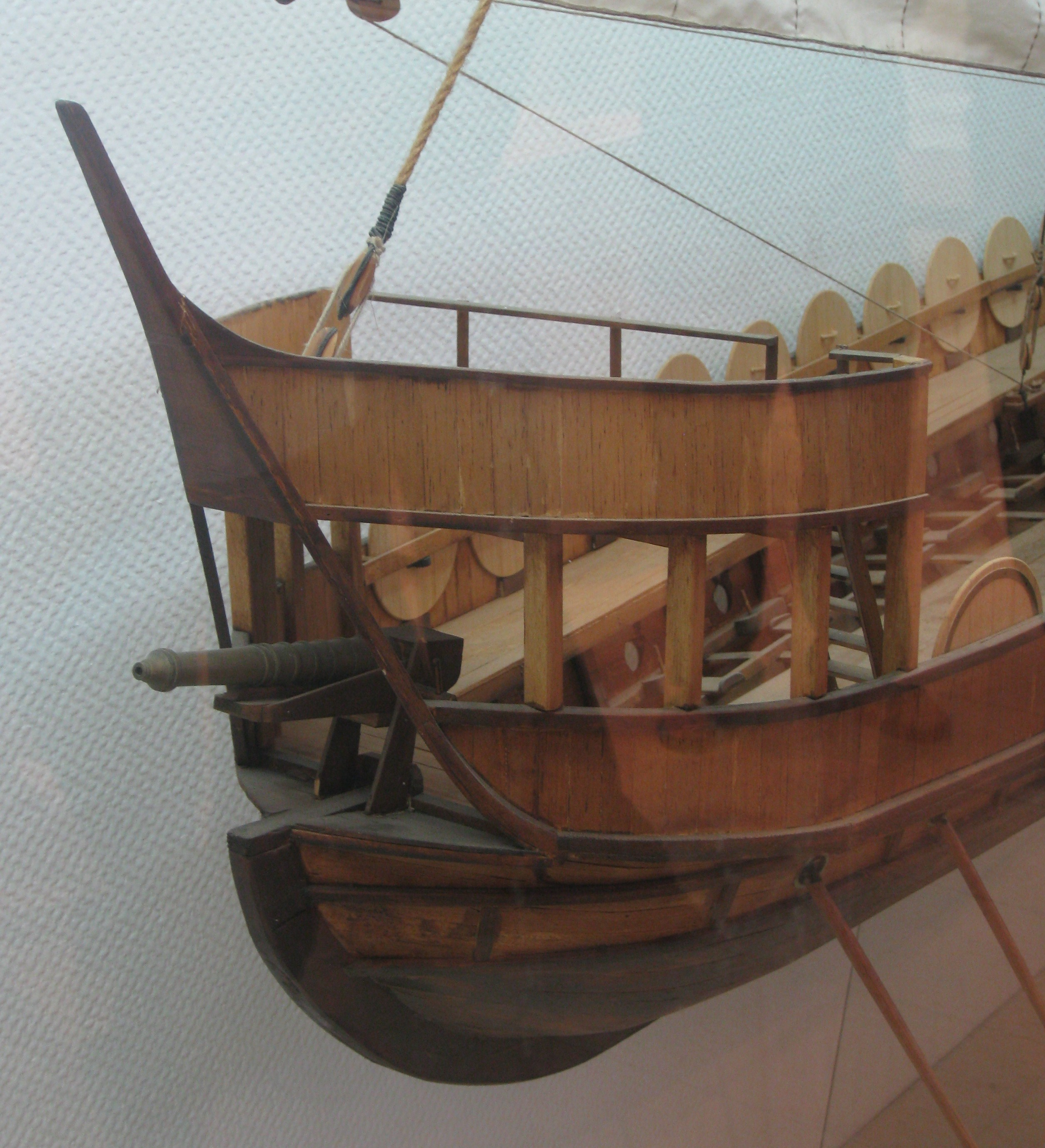 National Maritime Museum, Israel - Ship Models A modern model of a Byzantyne warship (Dromon) from the 9th Century CE. wood. Scale 1:12. Model built by Alexander Blokhin המוזיאון הימי הלאומי בחיפה דגמי ספינות דגם מודרני של ספינת מלחמה ביזנטית (דרומון) מהמאה התשיעית. קנה מידה: 1:12. הדגם עשוי עץ. בונה הדגם: אלכסנדר בלוכין